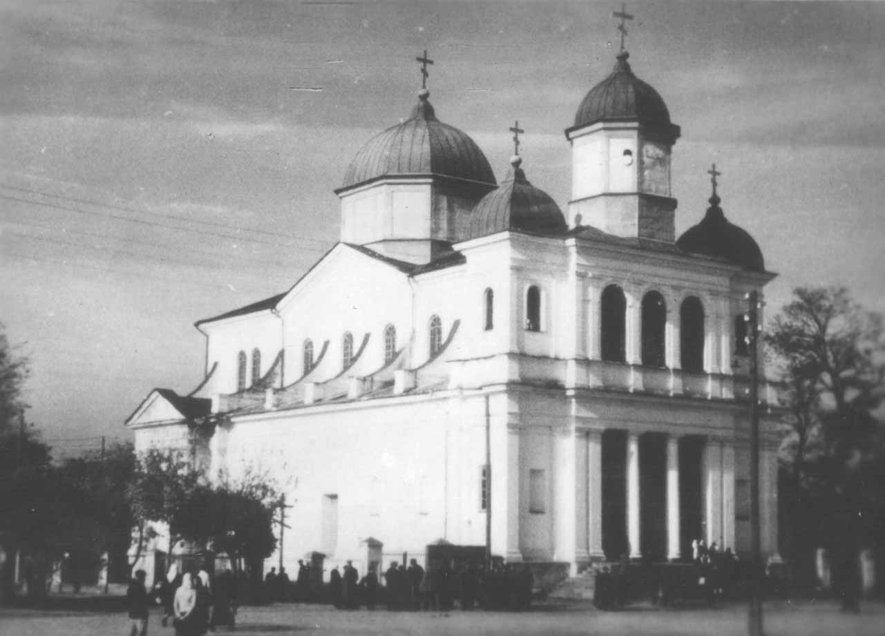 Беларуская (тарашкевіца): Пружаны (Pružany), вуліца Замкавая (vulica Zamkavaja). Прачысьценская царква (зьнішчаная)